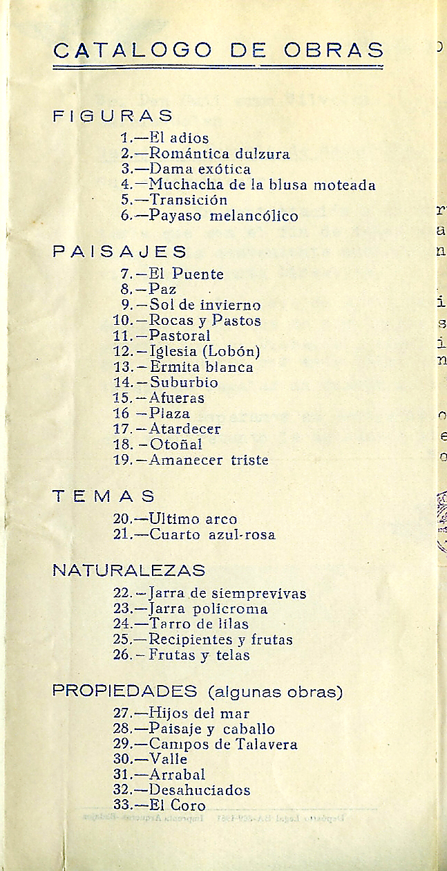 Díptico de la "Exposición de Óleos de Guillermo Silveira García-Galán". Sala de exposiciones de la Sociedad de Instrucción y Recreo Liceo de Mérida (Badajoz), 11-17 de diciembre de 1961. p. 3.